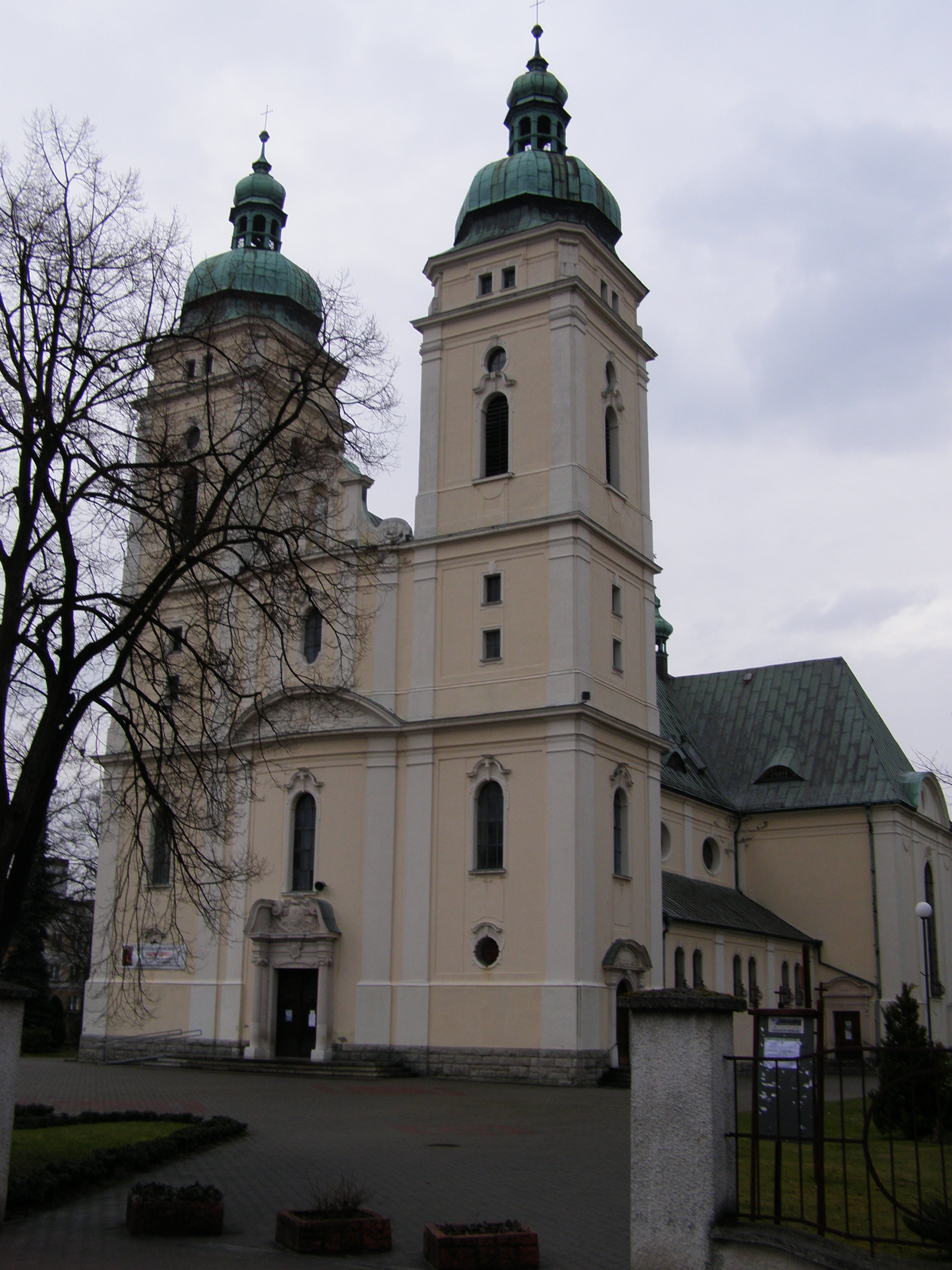 Piła, kościół p.w. Św. Rodziny